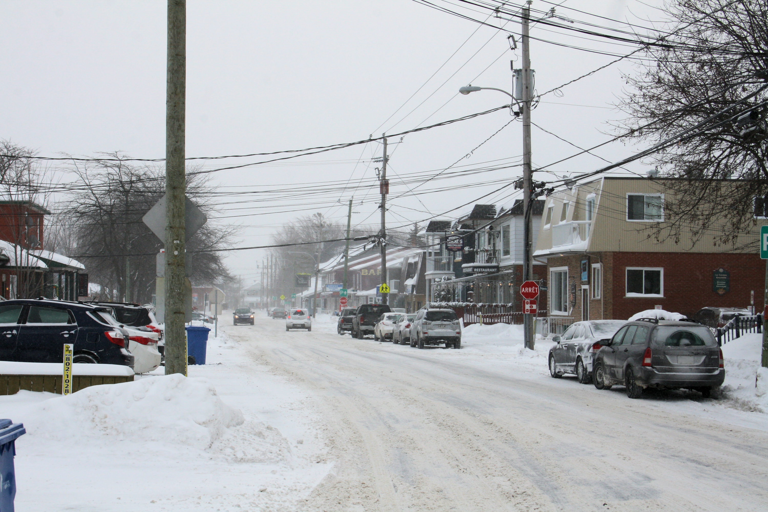 Coteau-du-Lac, Quebec, Canada